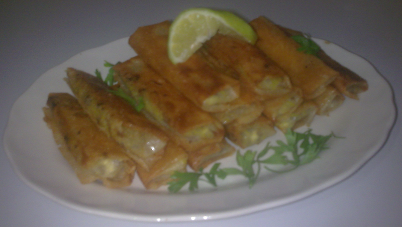 بوراك على الطريقة الوهرانية